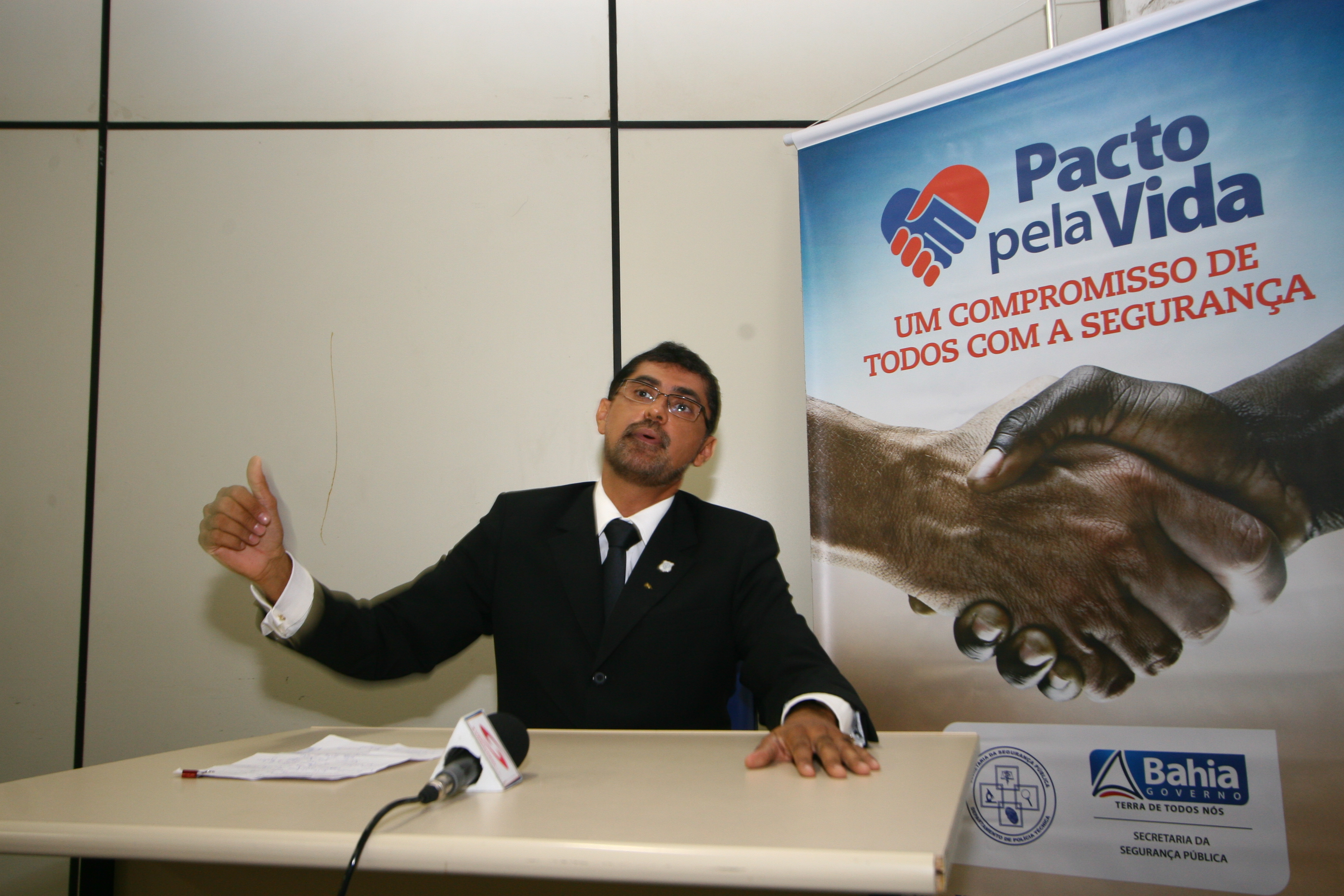 Posse do Novo Diteror DPT-Ba (Departamento de Policia Técnica da Bahia). . Na Foto: Elson Jefferson Neves da Silva / Atual diretor do DPT. . . Foto: Carla Ornelas / SECOM